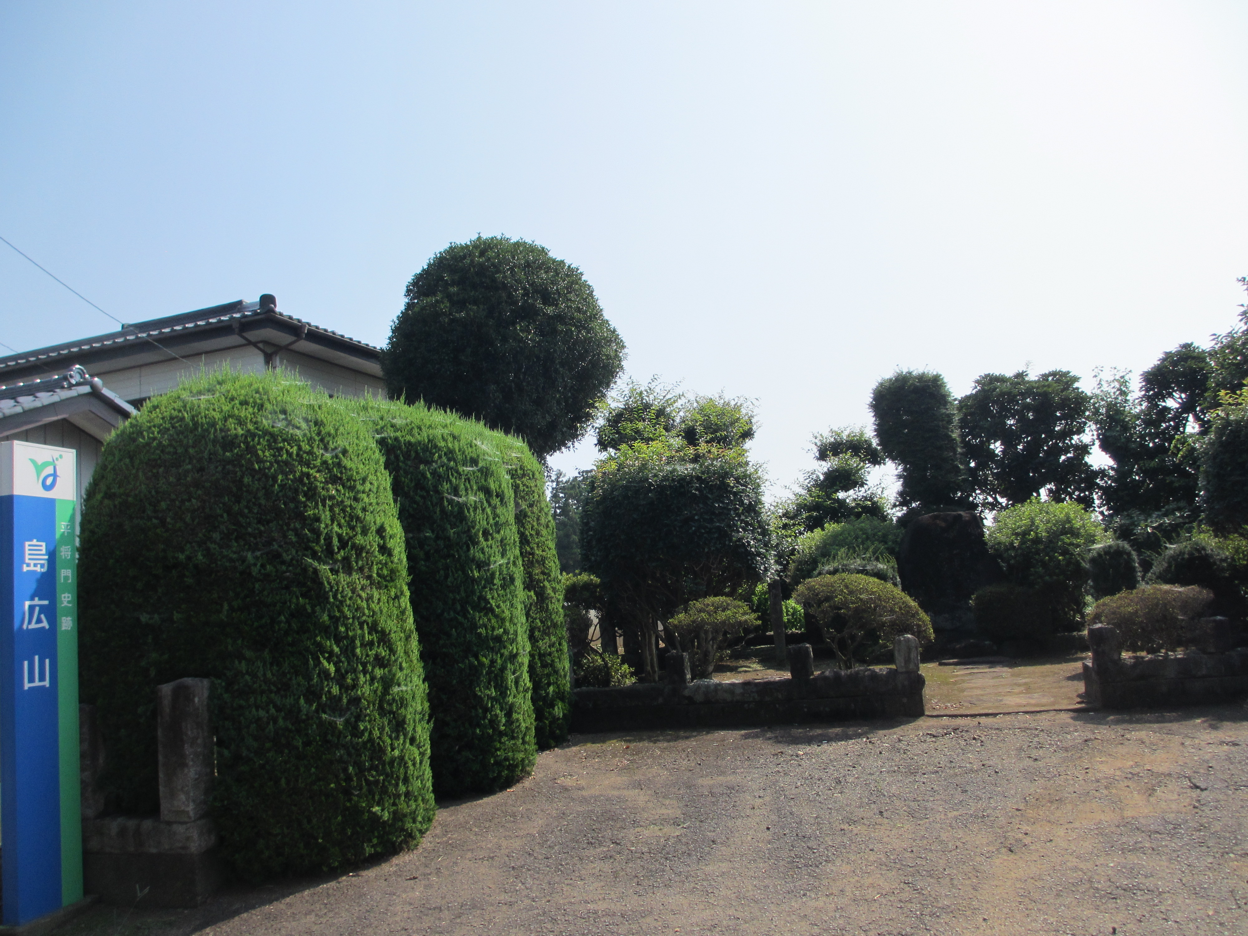 私鉄守谷ないし野田市駅からバス、結城坂東国道20号線挟んで国王神社向かい